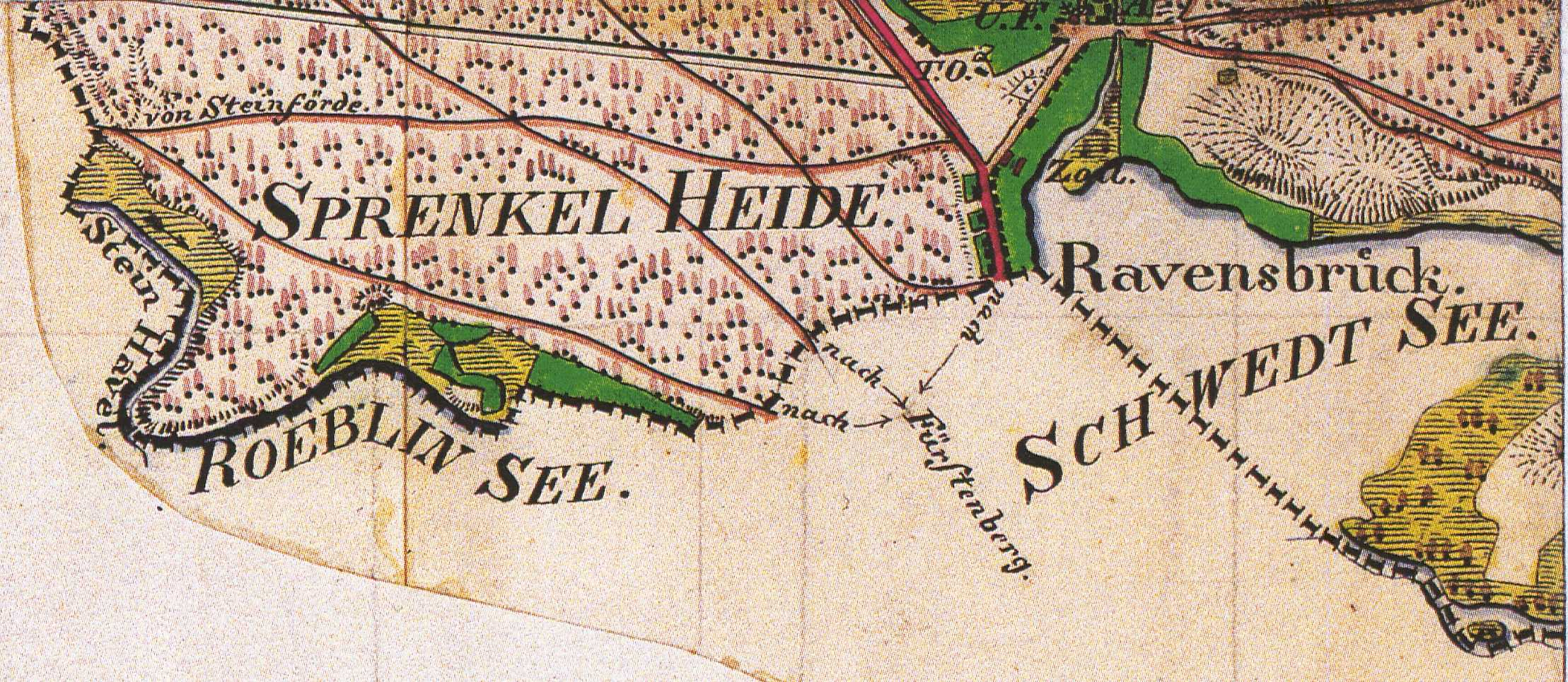 Ravensbrück, Wohnplatz von Fürstenberg/Havel, Lkr. Oberhavel, Brandenburg, Ausschnitt aus dem Urmesstischblatt Blatt 2844 Fürstenberg von 1825